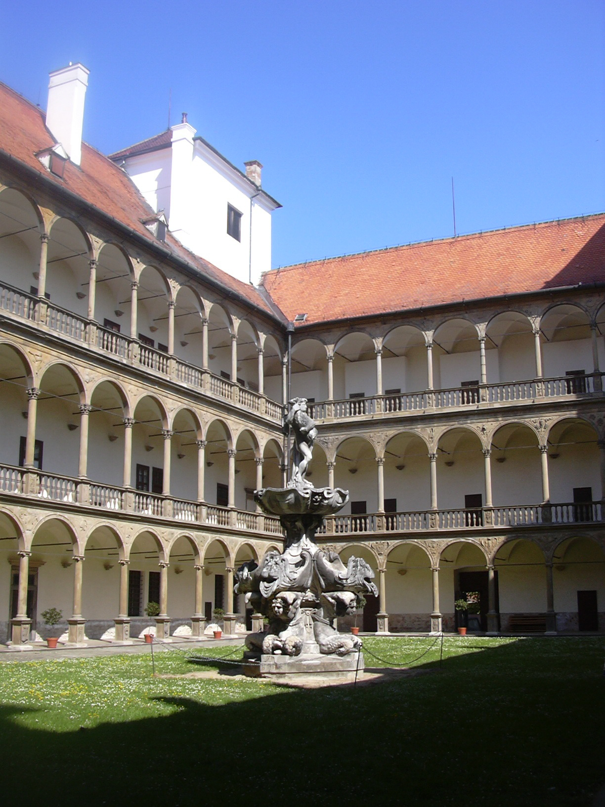 Státní zámek Bučovice